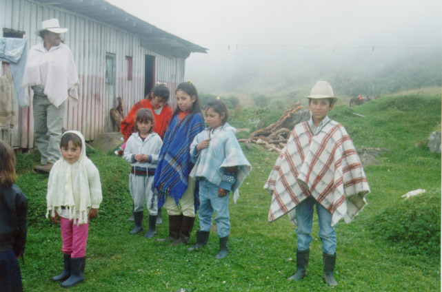 Laguna del Otún - Risaralda - Colombia - Zona alta de la cuenca del río Otún, moradores de la región Estudio del impacto ambiental del alcantarillado en la ciudad Director del estudio: Alfredo Bianco Geymet Financiamiento BID 1998